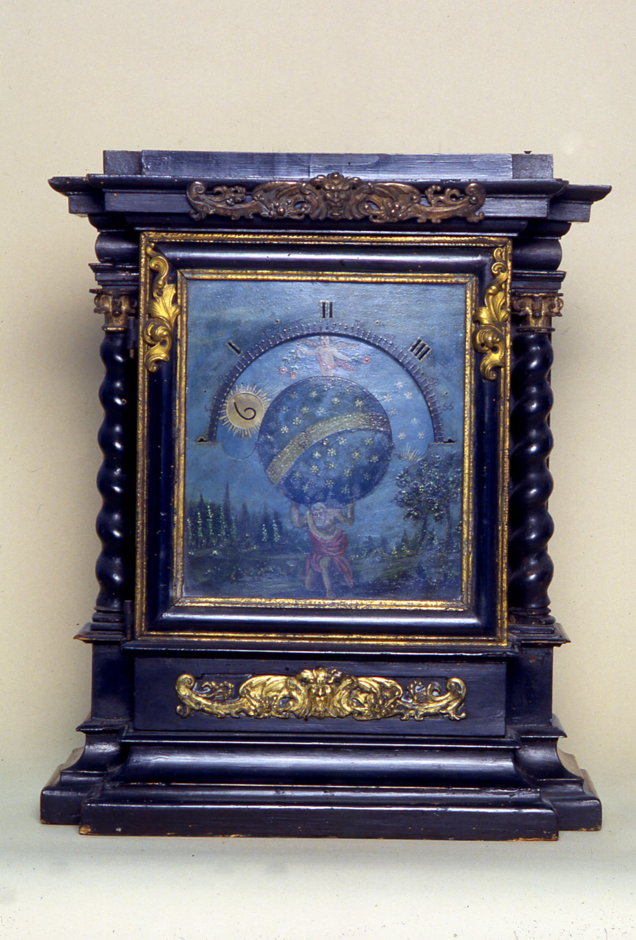 Cassa in legno nero con fregi in ottone e cornici dorate, ai lati due colonne a torciglione con capitelli in bronzo. Quadrante in metallo dipinto con al centro scena che rappresenta Atlante che regge la sfera celeste. Disco delle ore in ottone dipinto, con ore traforate in cifre arabe a cartigli con catenella. Semicerchio dei minuti con i quarti traforati in cifre latine. Movimento in ottone a platine circolari con colonne tornite. Conoide a budello, scappamento a verga regolato da pendolo con forchetta. Modalità d'uso Tipologia di orologia inventata dai fratelli Campani per esaudire il desiderio di papa Alessandro VII che desiderava leggere l'ora nell'oscurità della notte. I cartellini delle ore, intagliati e disposti su una catenella, scorrono dietro ad un finestrella del quadrante. La finestrella è illuminata da una piccola candela, posta all'interno della cassa, in modo da visualizzare le ore. Un foro nella parte superiore della cassa permette la fuoriuscita del fumo.